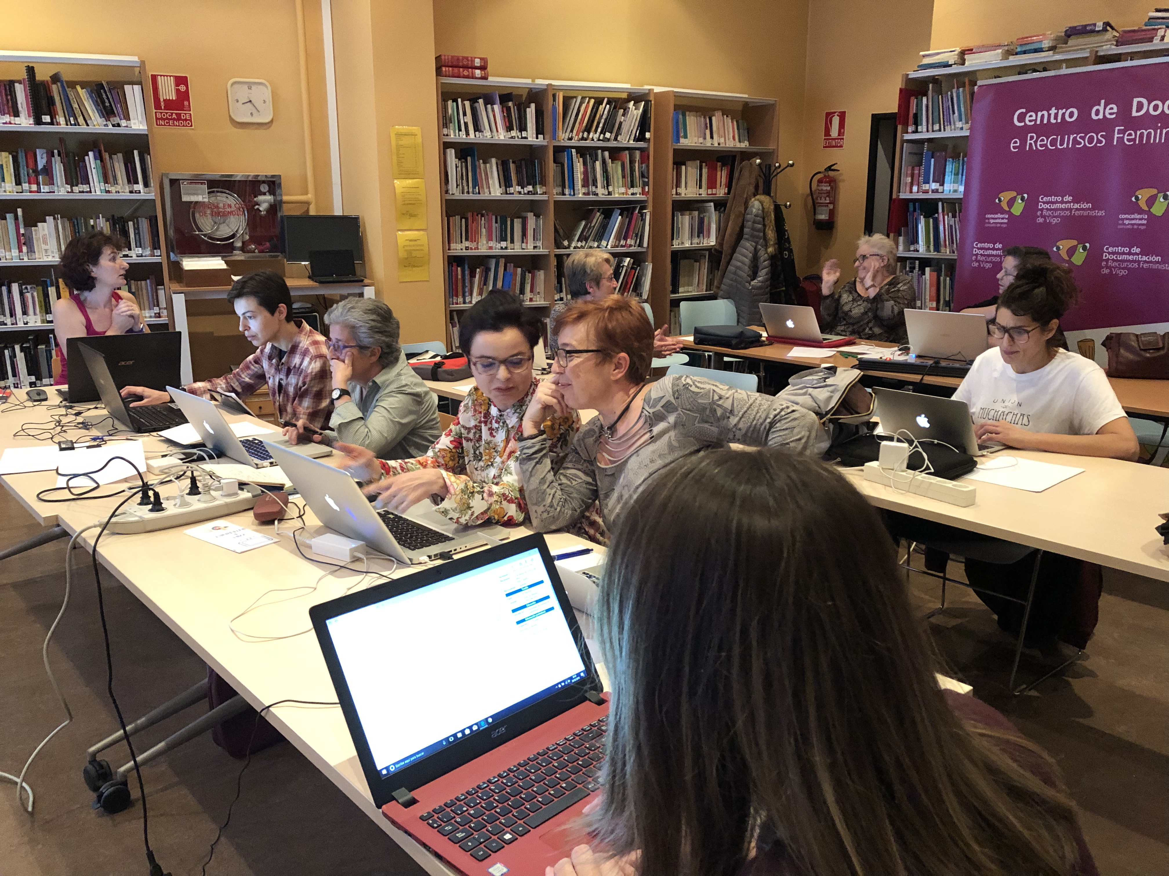 Taller de Wikimujeres, centro de Documentacion Feminista de Vigo